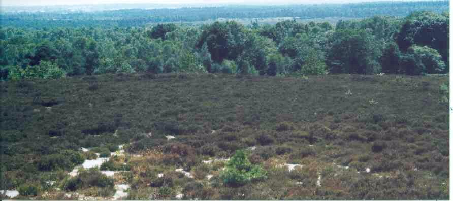 Uitzicht vanaf de Sallandse heuvelrug, eigen foto van Marco Roepers